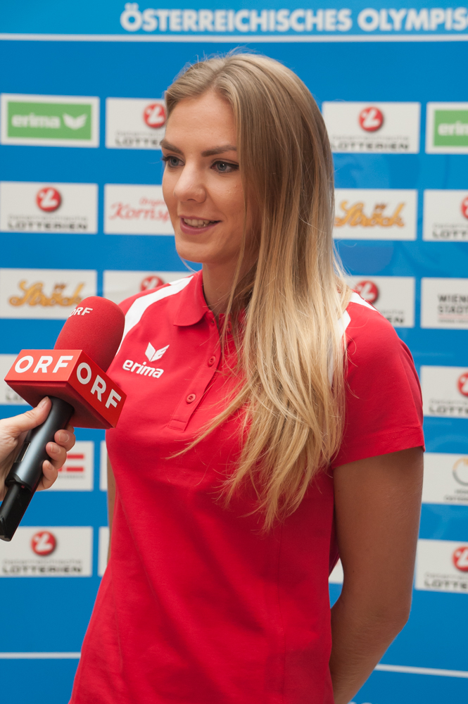 Einkleidung der Österreichischen Teilnehmer an den Olympischen Sommerspielen 2016 am 16./17. Juli 2016 in Wien. Bild zeigt Ivona Dadic.